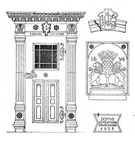 Az Unió utca 15. szám alatti műemlék épület ajtaja 1654-ből, a kapu feletti címerpajzs 1653-ból és szűcsjelvény 1684-ből, Pákey Lajos rajzán